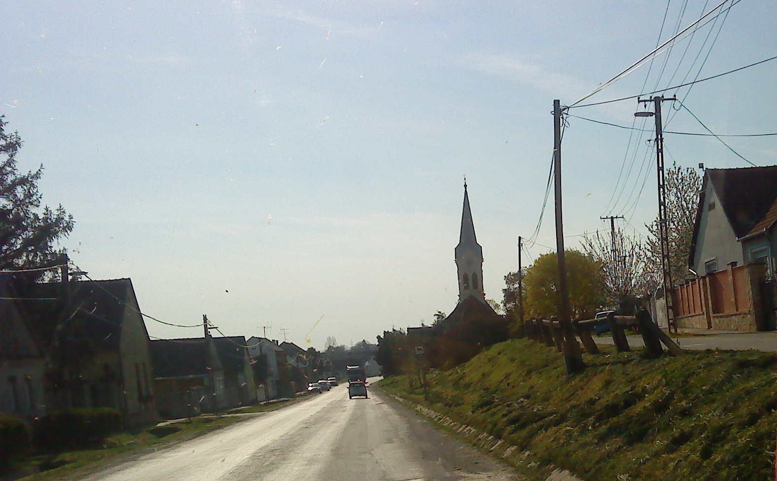 Nagyharsány utcakép